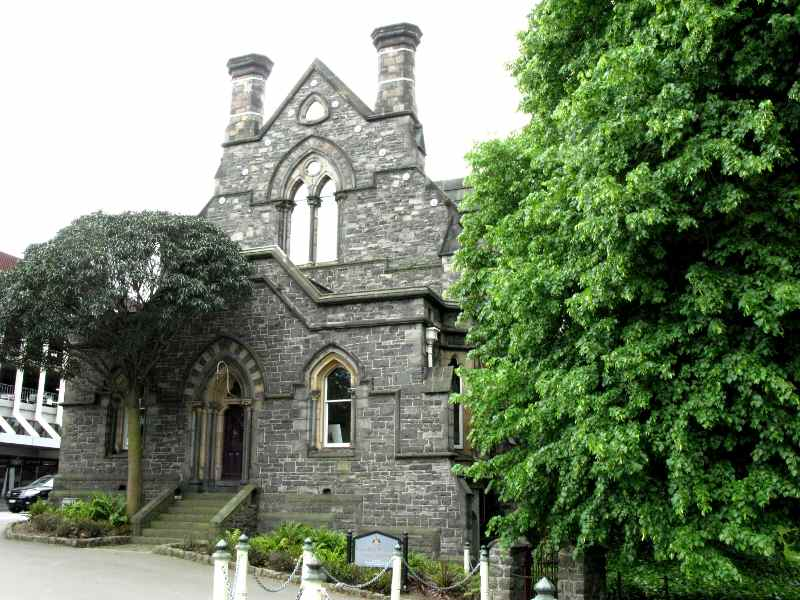 2008-11-18, Stone Church in Christchurch